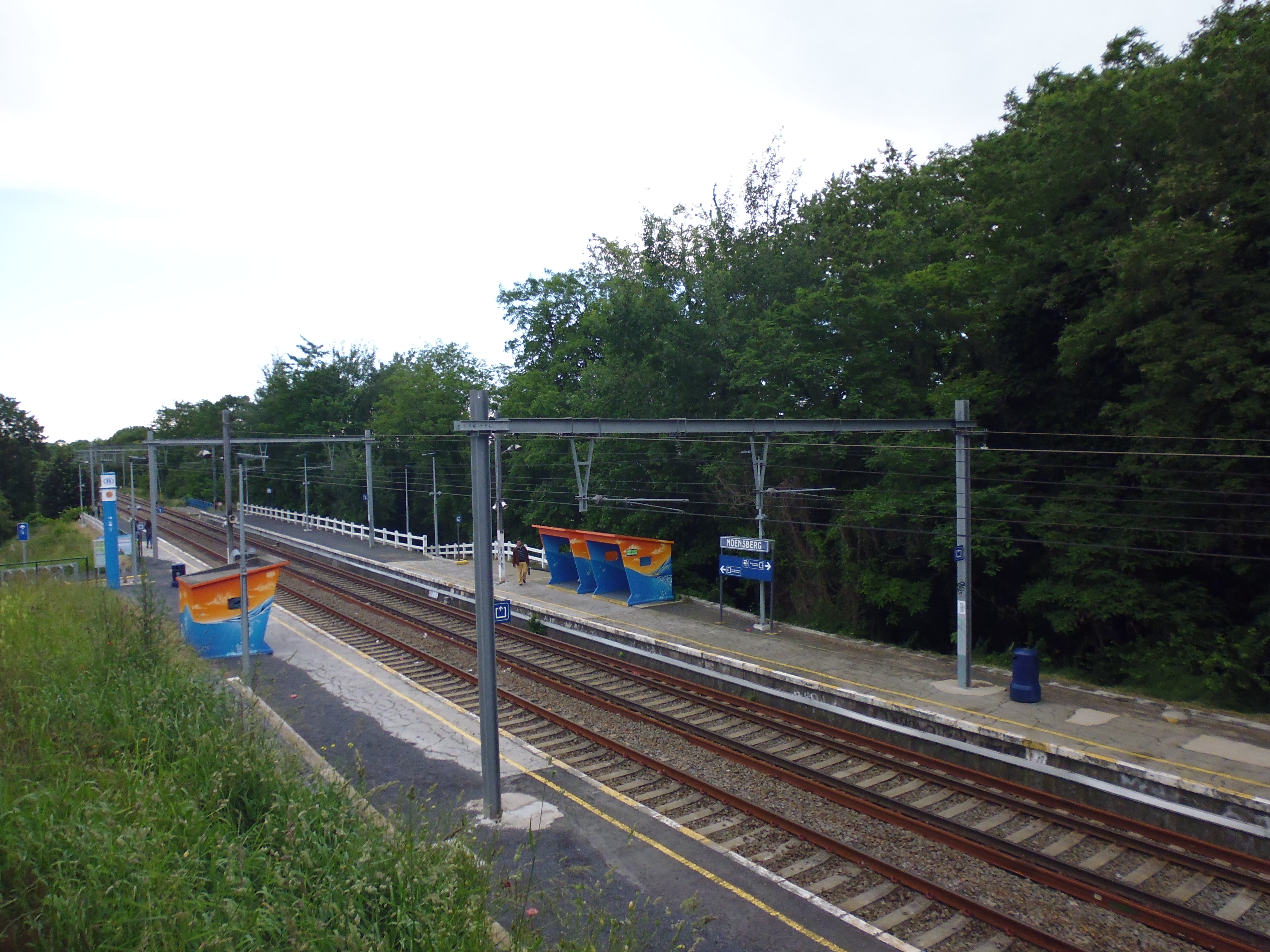 Gare de Moensberg vue depuis la rue éponyme.